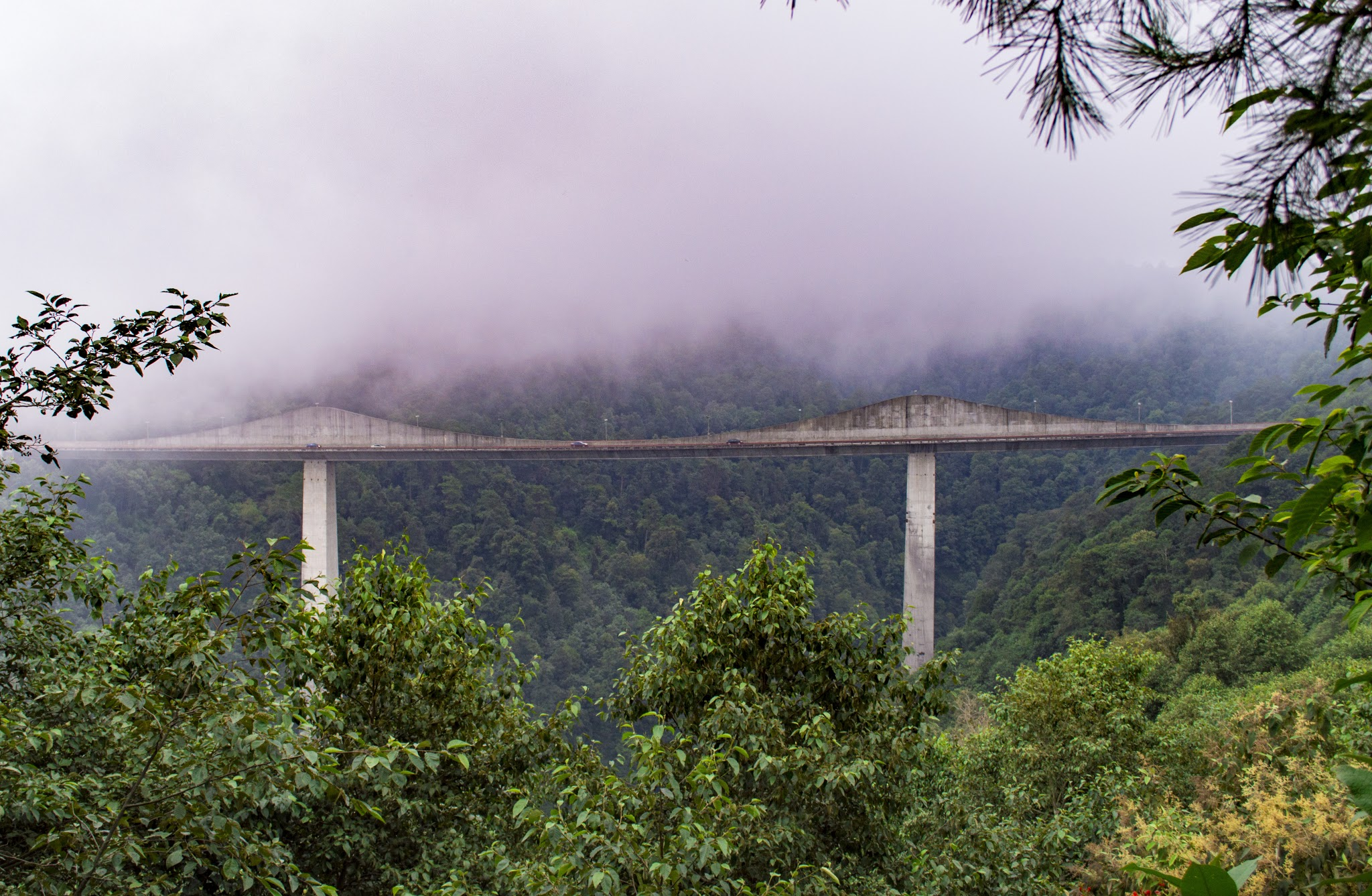 Acaxochitlán, Hgo., Mexico